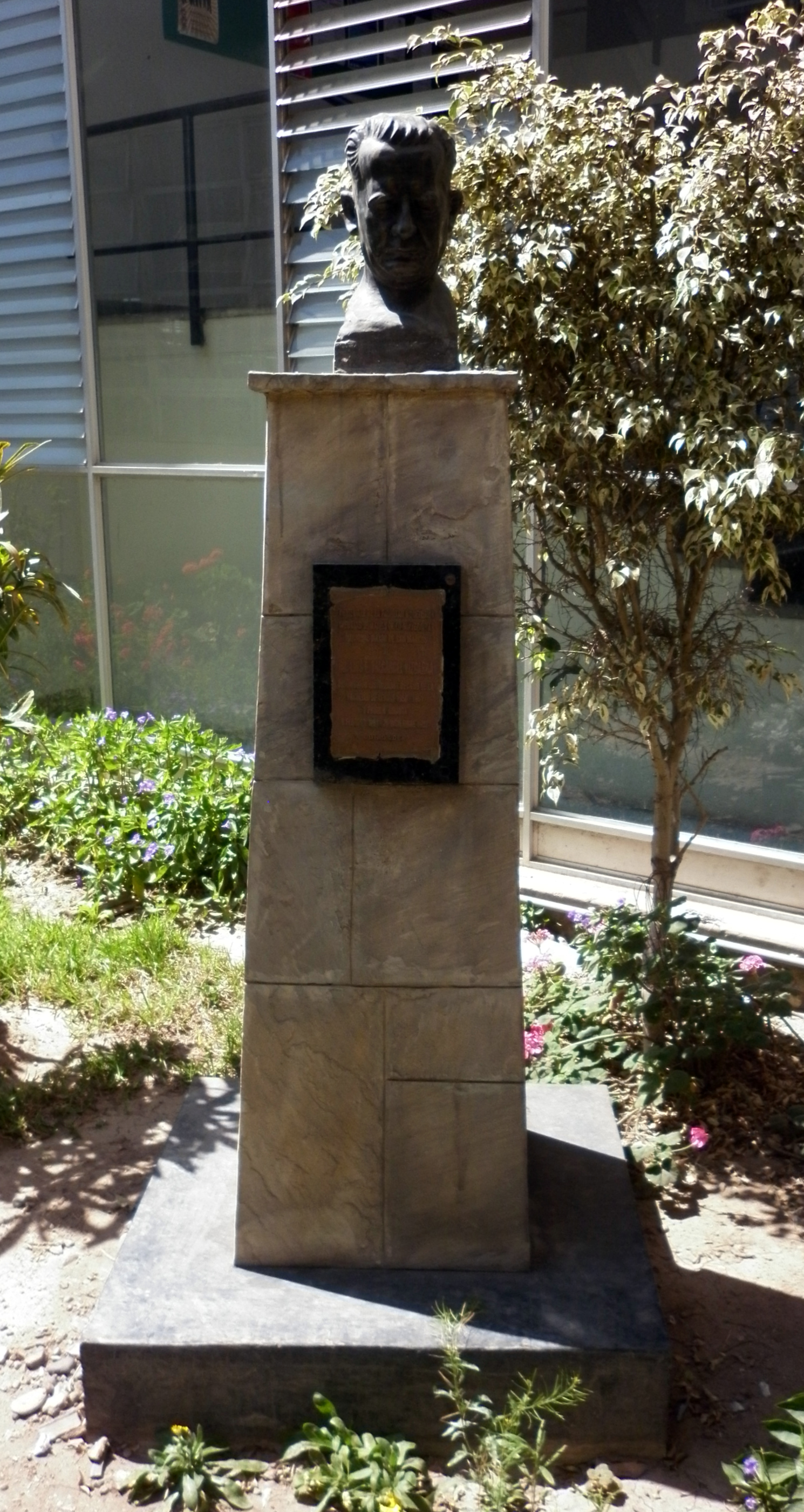 Monumento de Luis E. Valcarcel en el interior de la Facultad de Letras y Ciencias Humanas de la Universidad Nacional Mayor de San Marcos